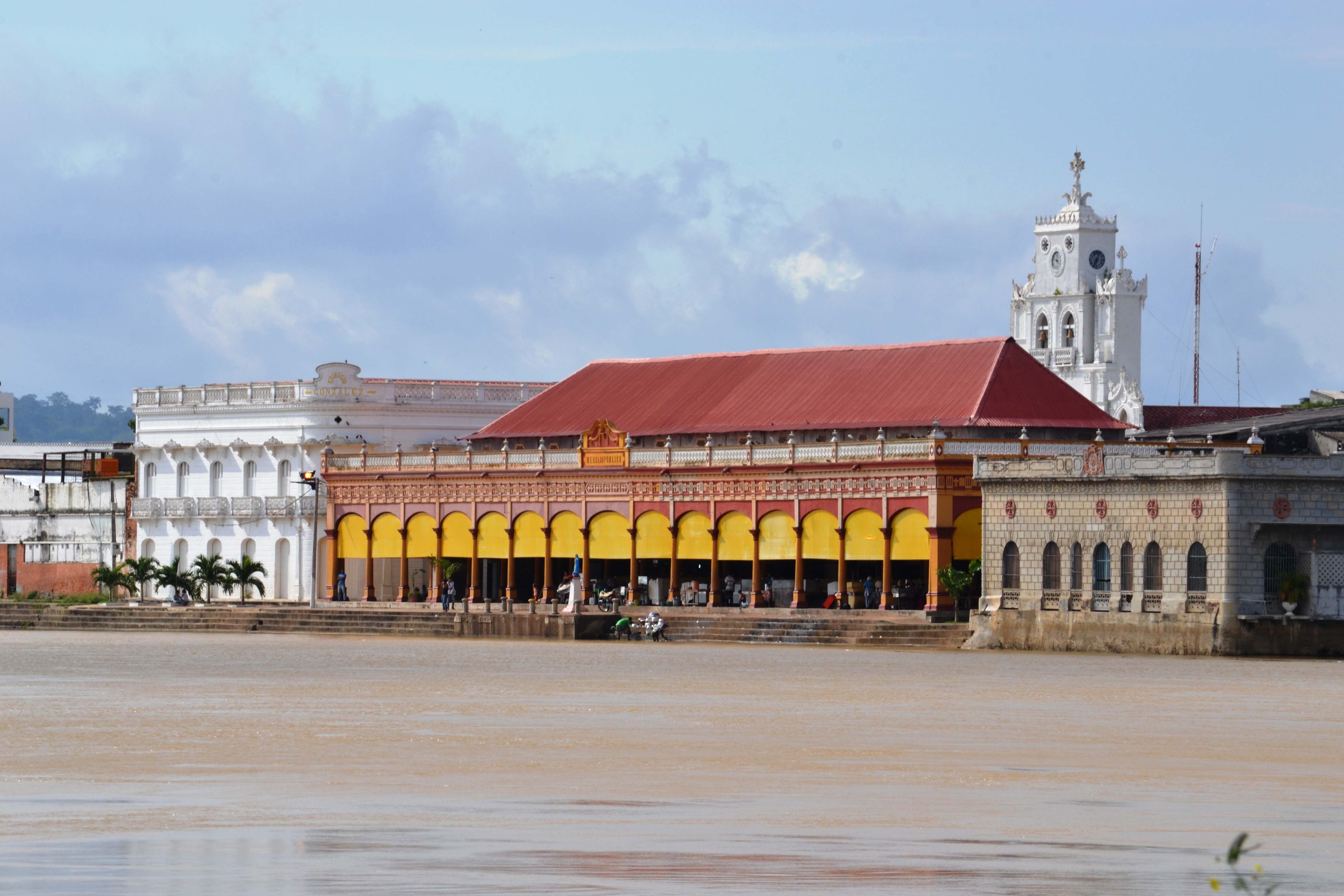 Centro Histórico de Lorica